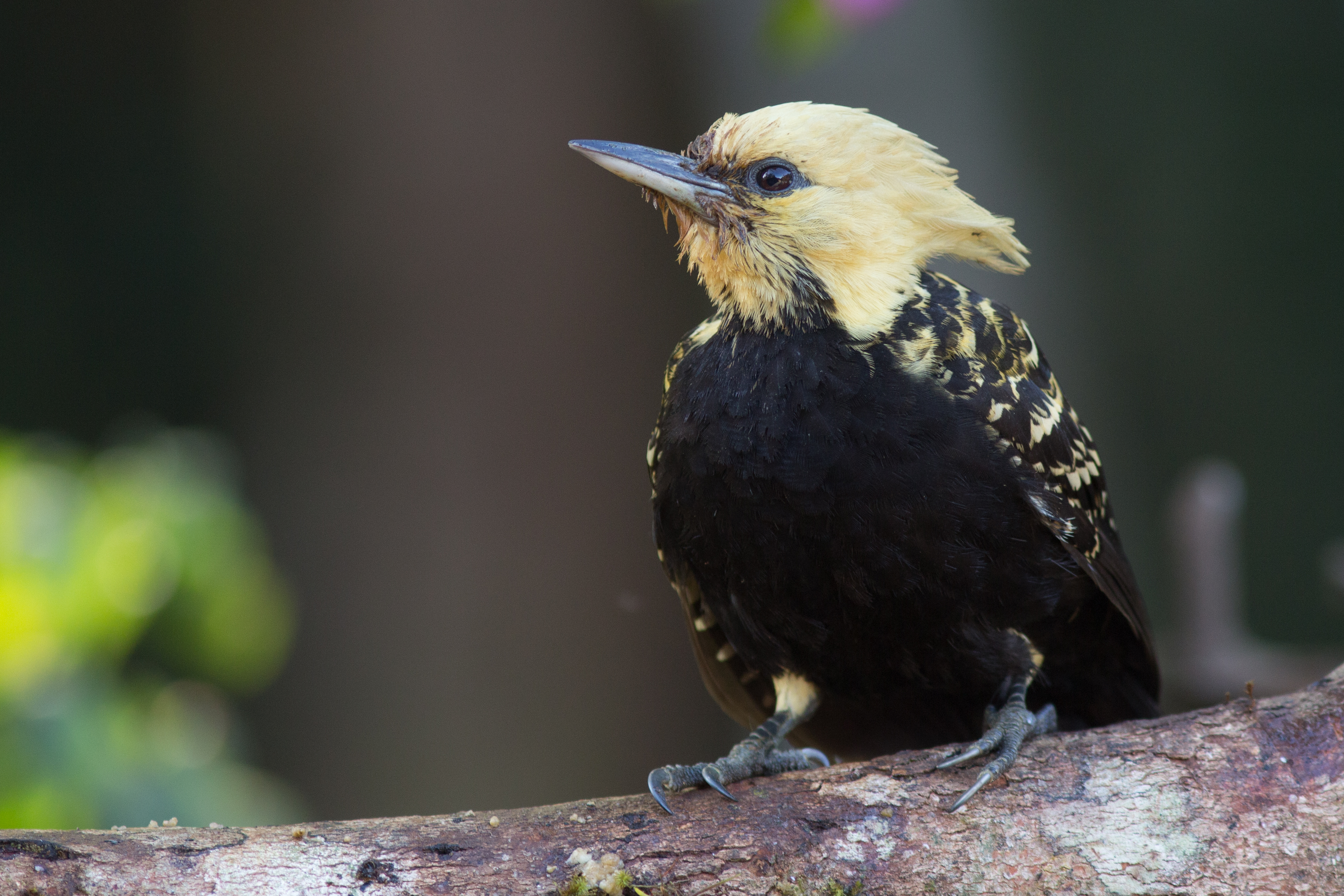 Pica-pau-de-cabeça-amarela (Celeus flavescens)